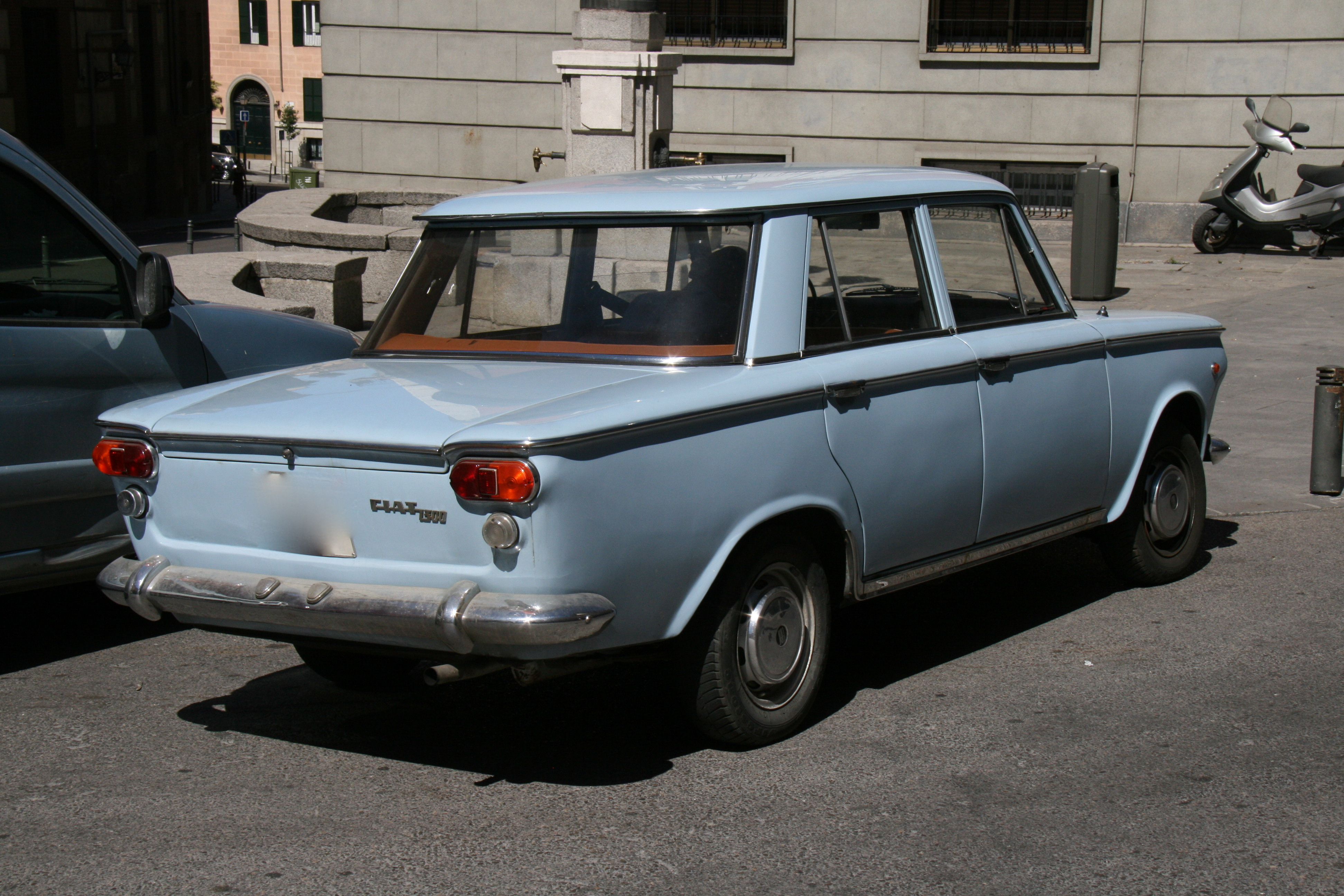 Fiat 1300 - Madrid